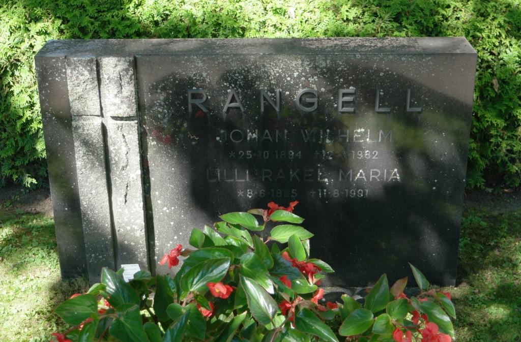 Grab des finnischen Sportfunktionärs und Politikers Johan (Jukka) Wilhelm Rangell (1894-1982) auf dem Friedhof Hietaniemi in Helsinki